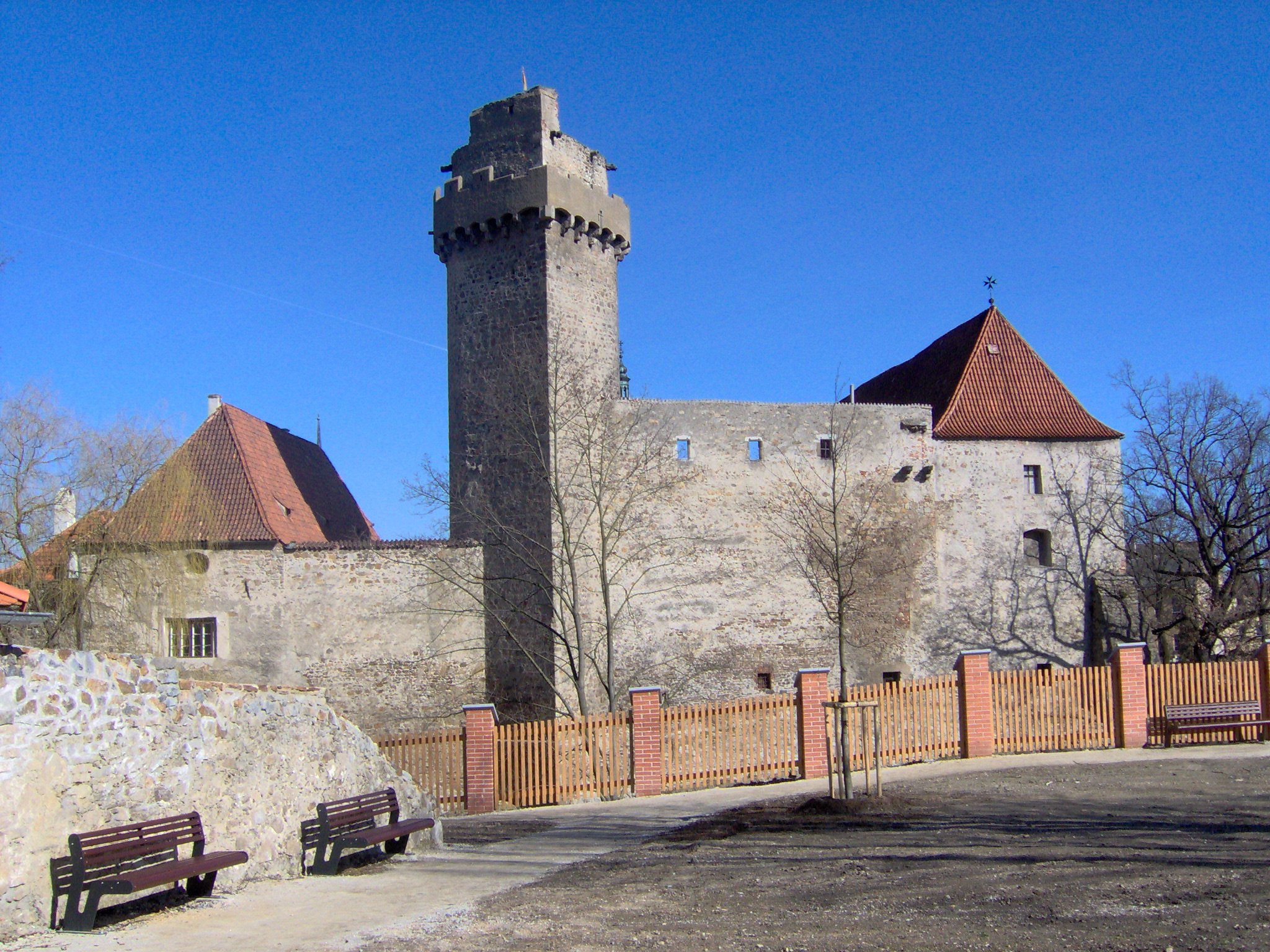 Castle of Strakonice, tower "Rumpál" - strakonický hrad, vež Rumpál